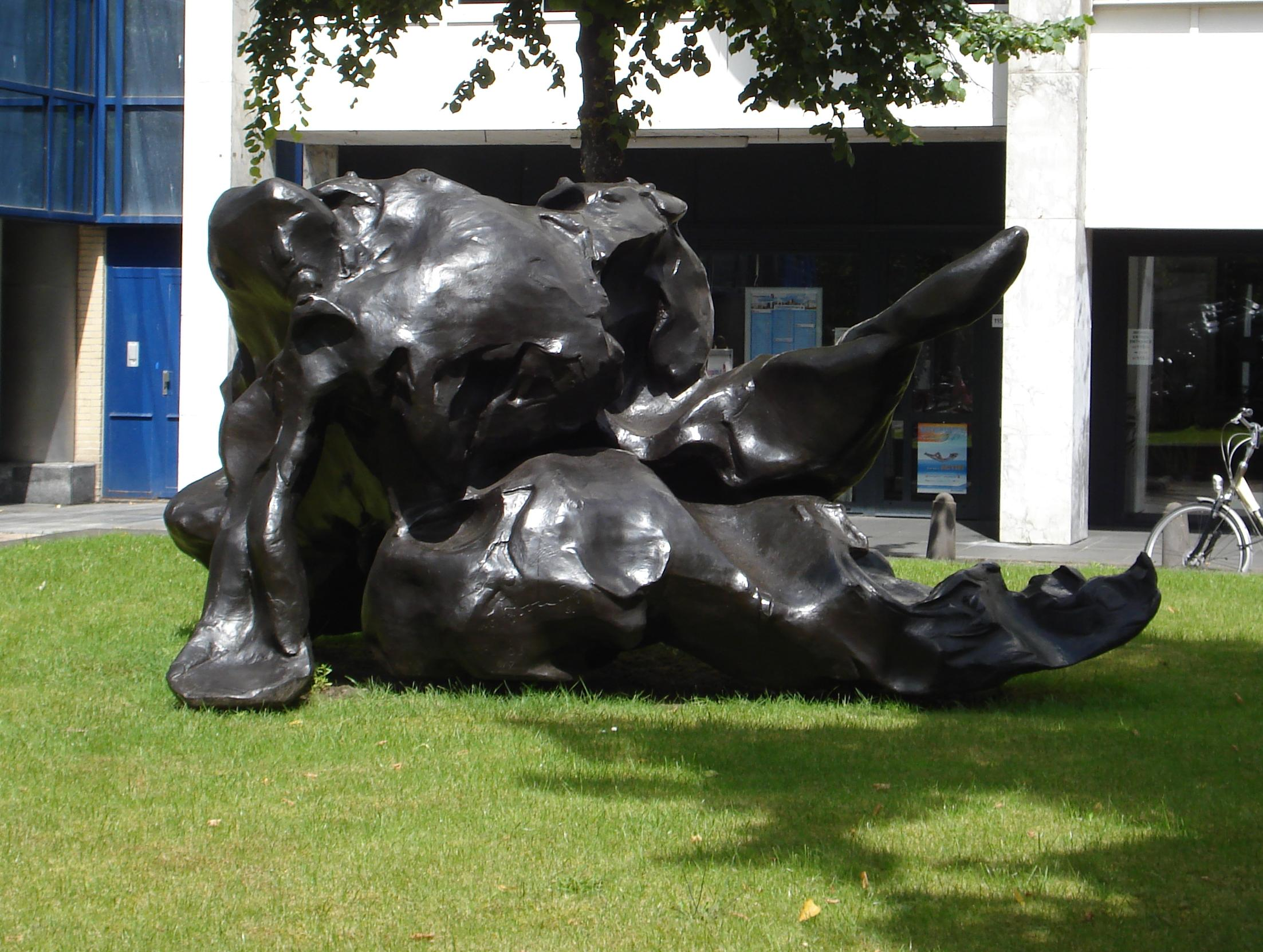 Rotterdam Weena. Kunstwerk "Reclining figure" van Willem de Kooning. Rotterdam/The Netherlands.